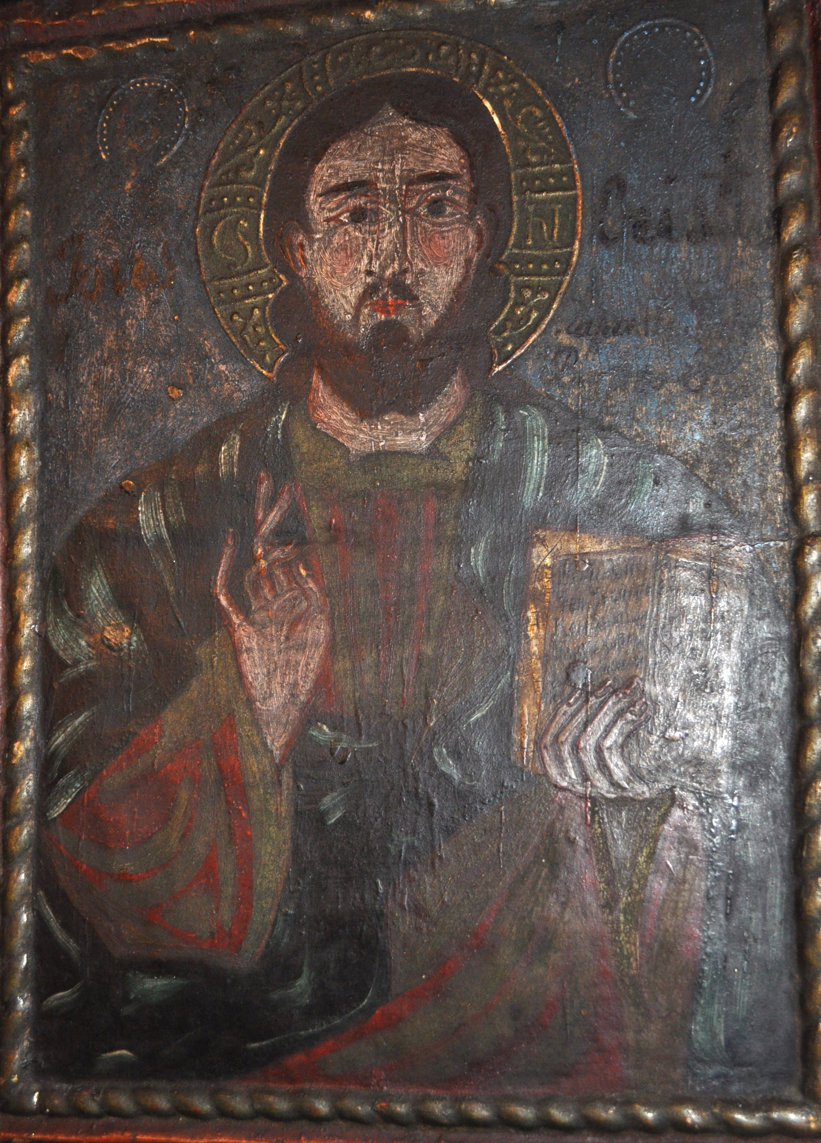 Biserica de lemn din Nadășu, județul Cluj